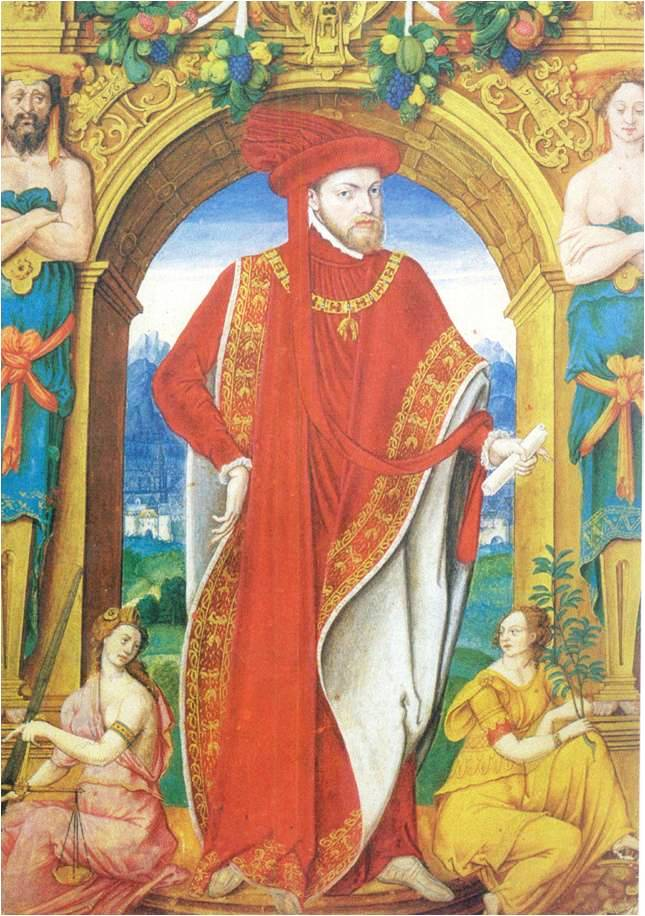 Esta miniatura, que representa al rey Felipe II de España (1527-1598) vestido con el hábito y el manto de la Orden del Toisón de Oro, forma parte del Libro del Toisón de Oro, conservando en el Instituto Valencia de Don Juan de Madrid, (España).